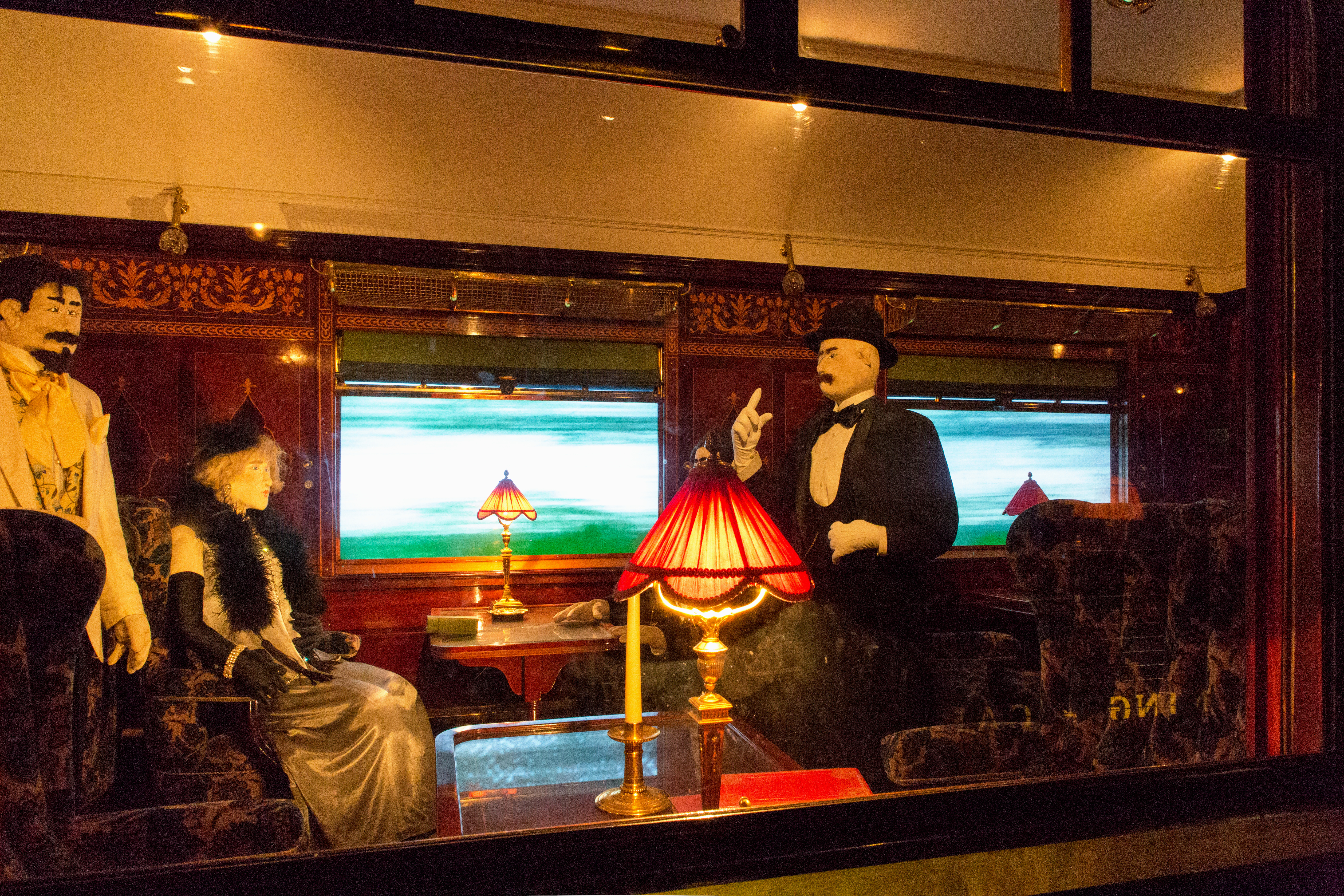 Scène de vie à bord d'une voiture Pullman CIWL à la Cité du train.